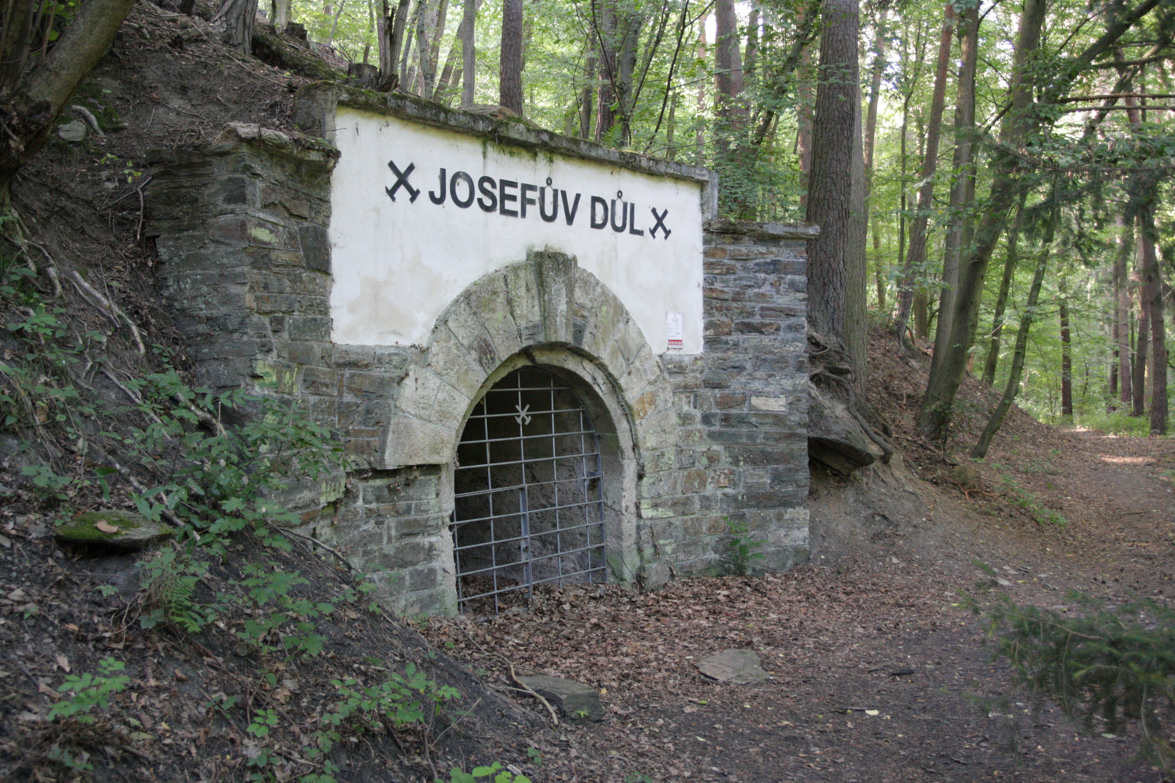 Čučice - Josefův důl východně od obce.